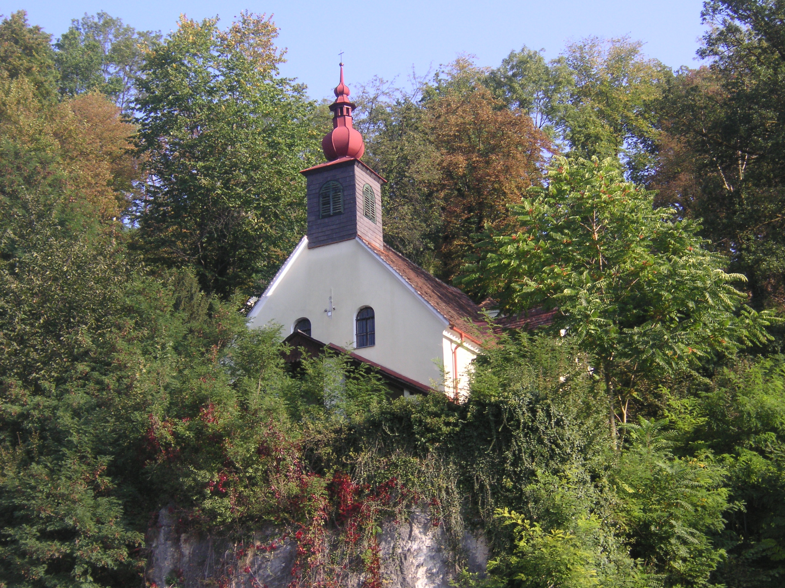 Die Ölbergkapelle in Deutschfeistritz, vom Ort aus gesehen